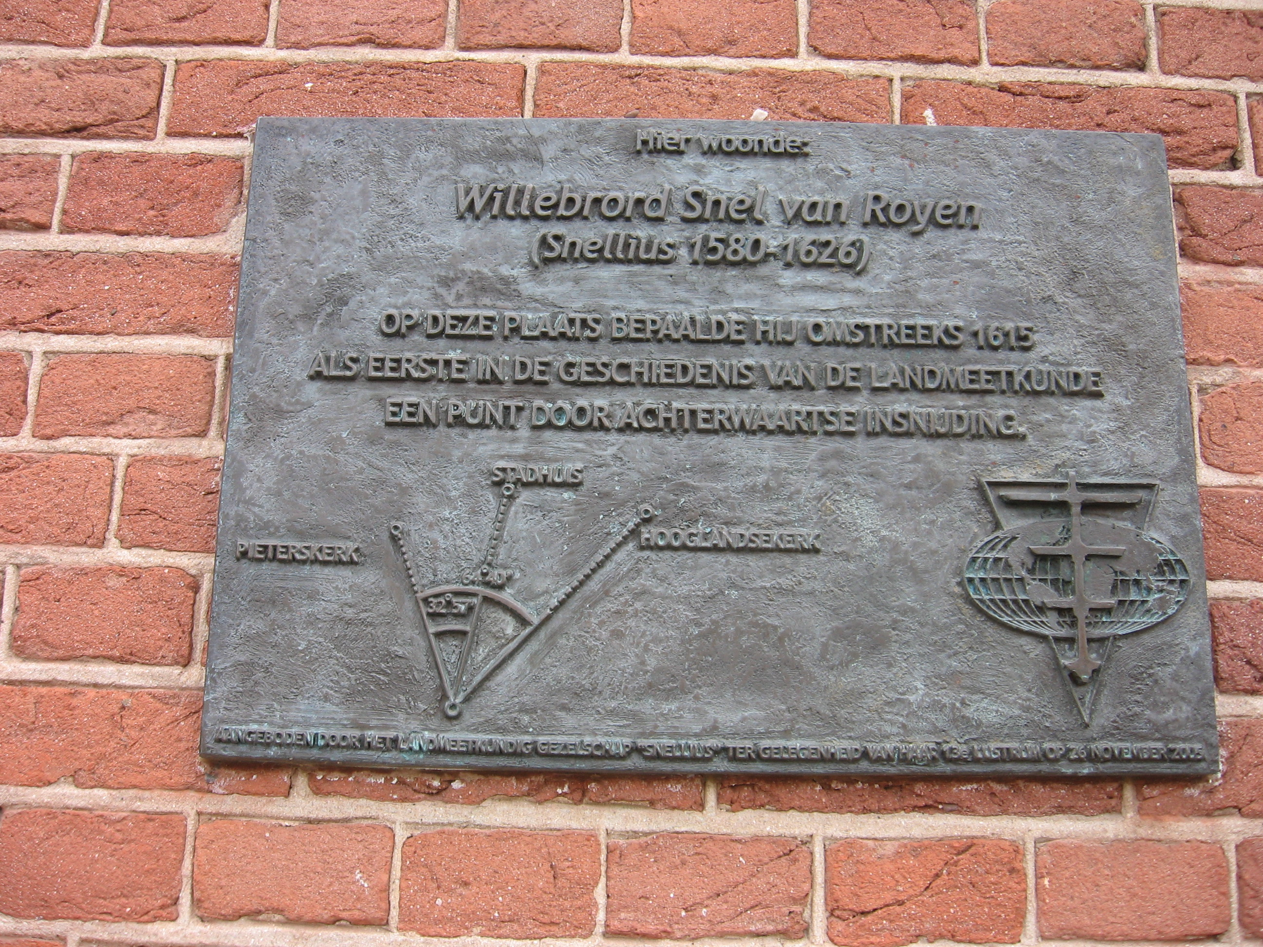 Plaquete huis Willebrord Snellius, Leiden